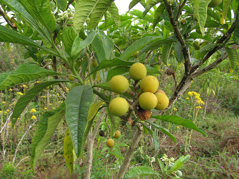 Cucubo (Solanum oblongifolium) en Bogotá, Colombia.